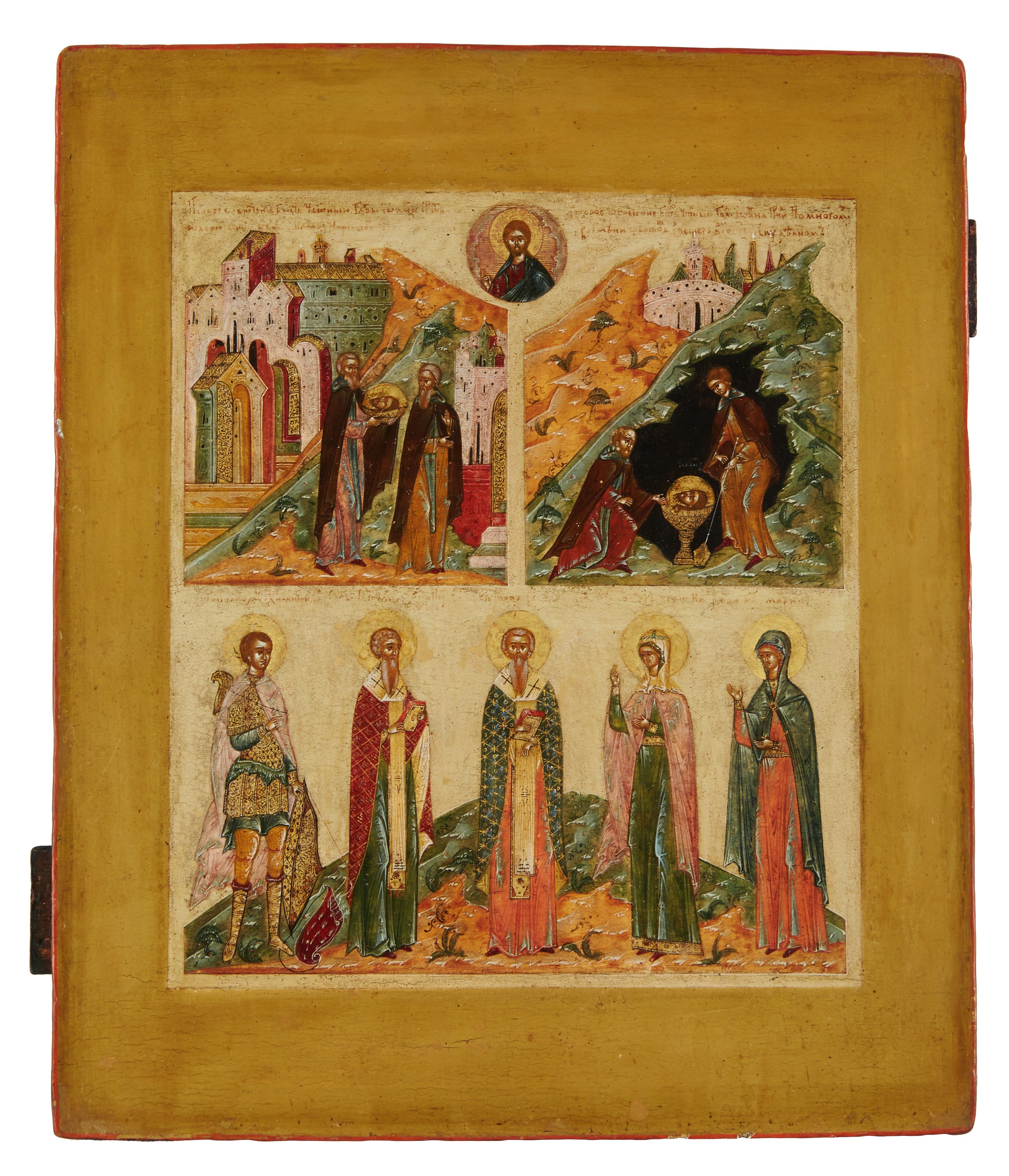 Icone représentant la première et seconde invention du chef de saint Jean-Baptiste, école de Moscou, auteur anonyme, XVIIe siècle